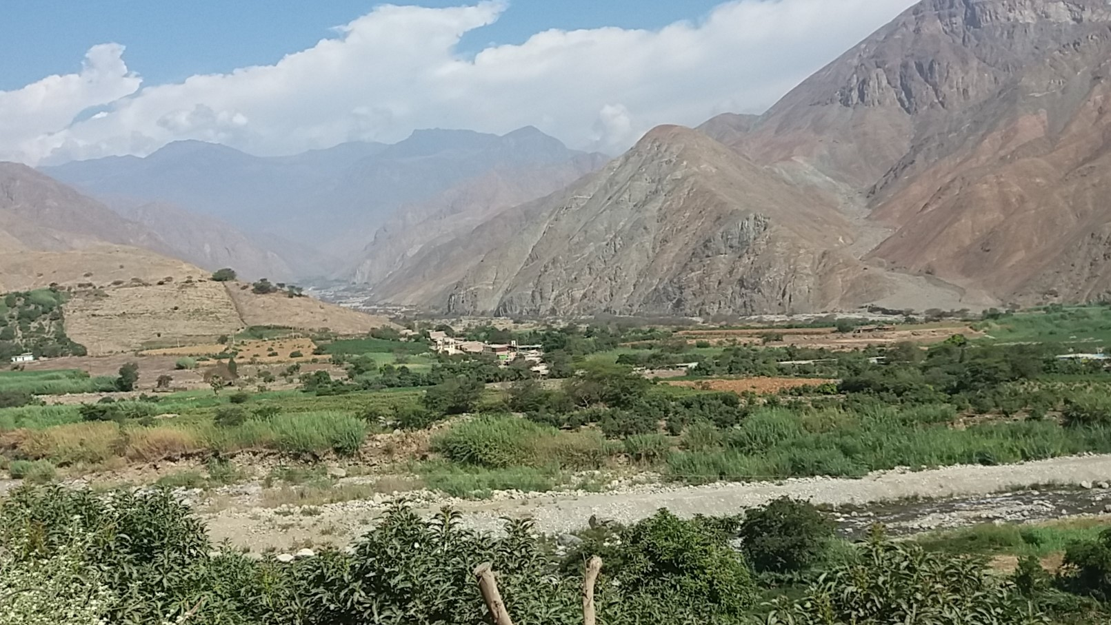 Origen del valle del río Huarmey por la unión de los ríos Malvas y Aija en el departamento de Áncash, en el Perú.